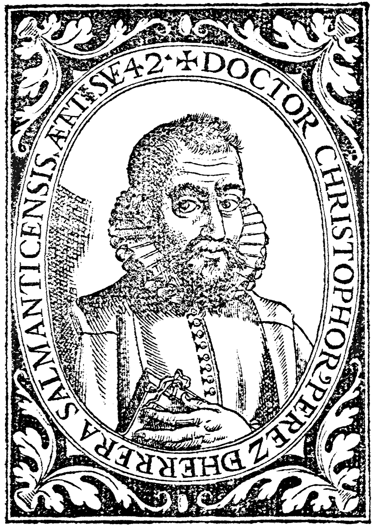 Cristóbal Pérez de Herrera (Salamanca, 1558 - Madrid, 1620) militar, médico, político y poeta español.